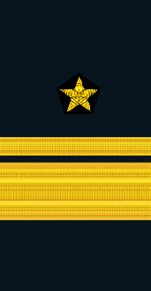 Contraalmirante